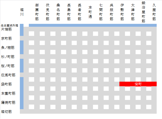 名古屋城下碁盤割模式図（宝町位置）